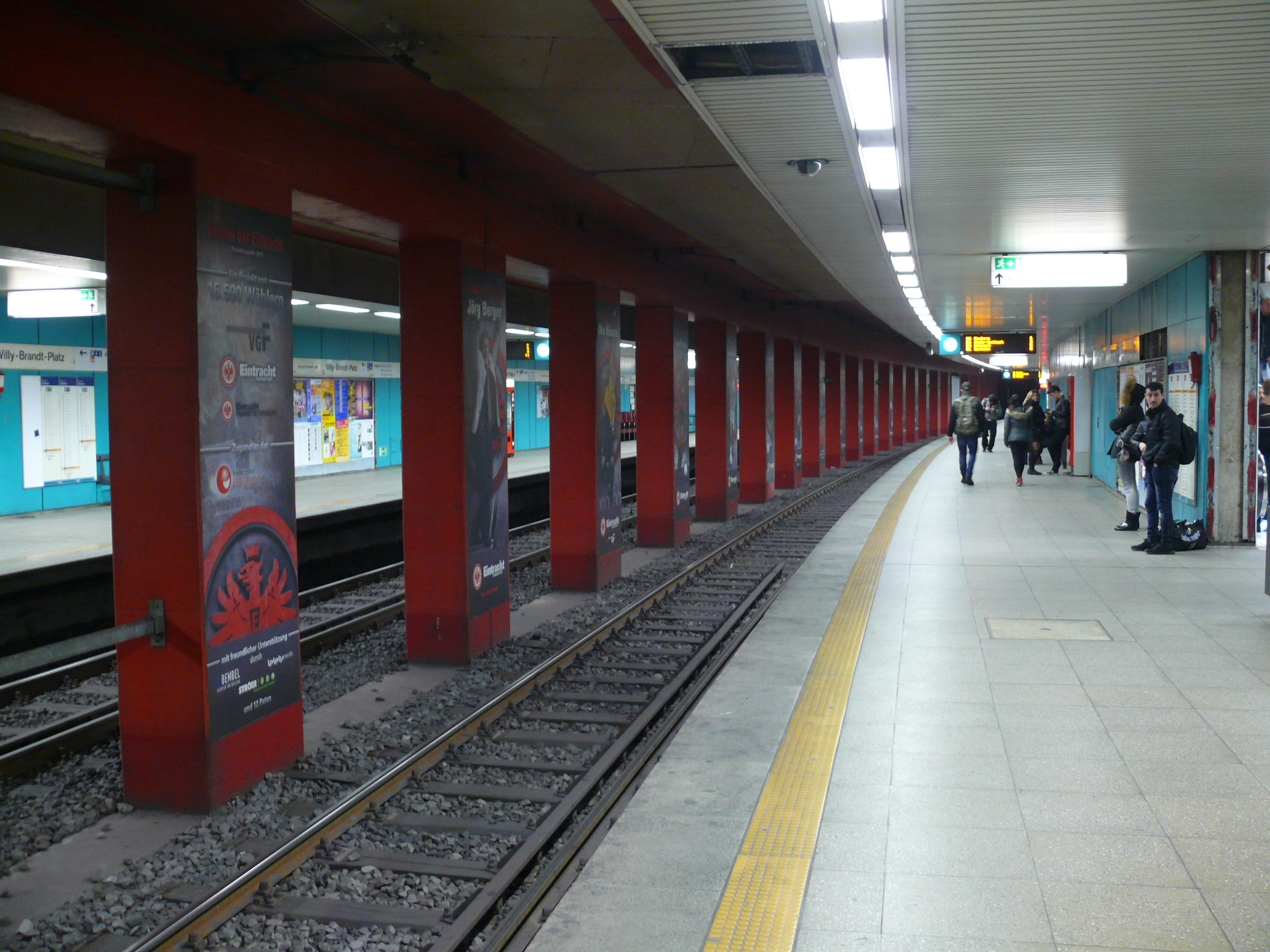 Bahnsteigebene am U-Bahnhof Willy-Brandt-Platz (A-Strecke) in Frankfurt. Hier mit den "Säulen der Eintracht".